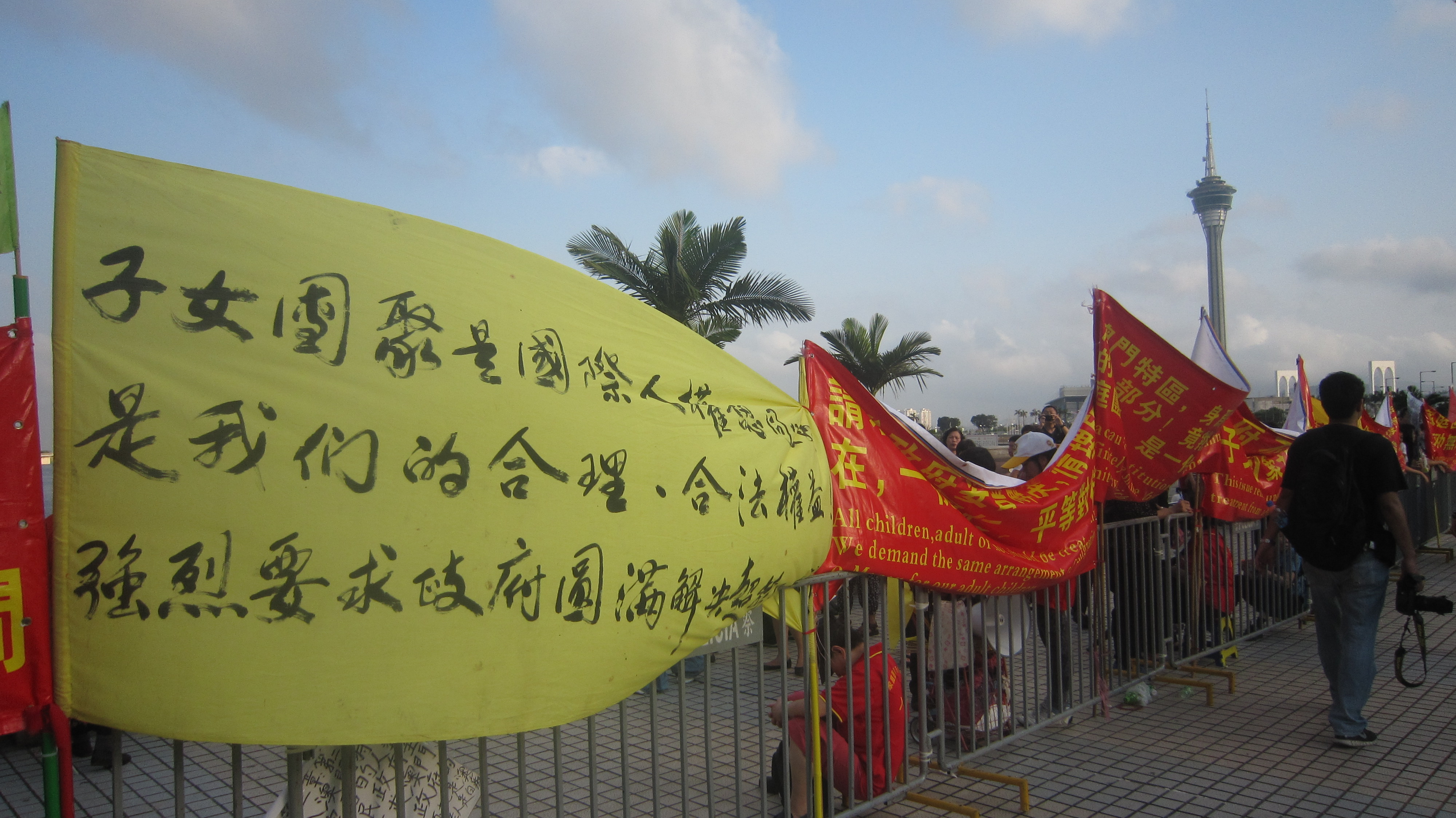 Procissão em 1 de Maio de 2012 em Macau